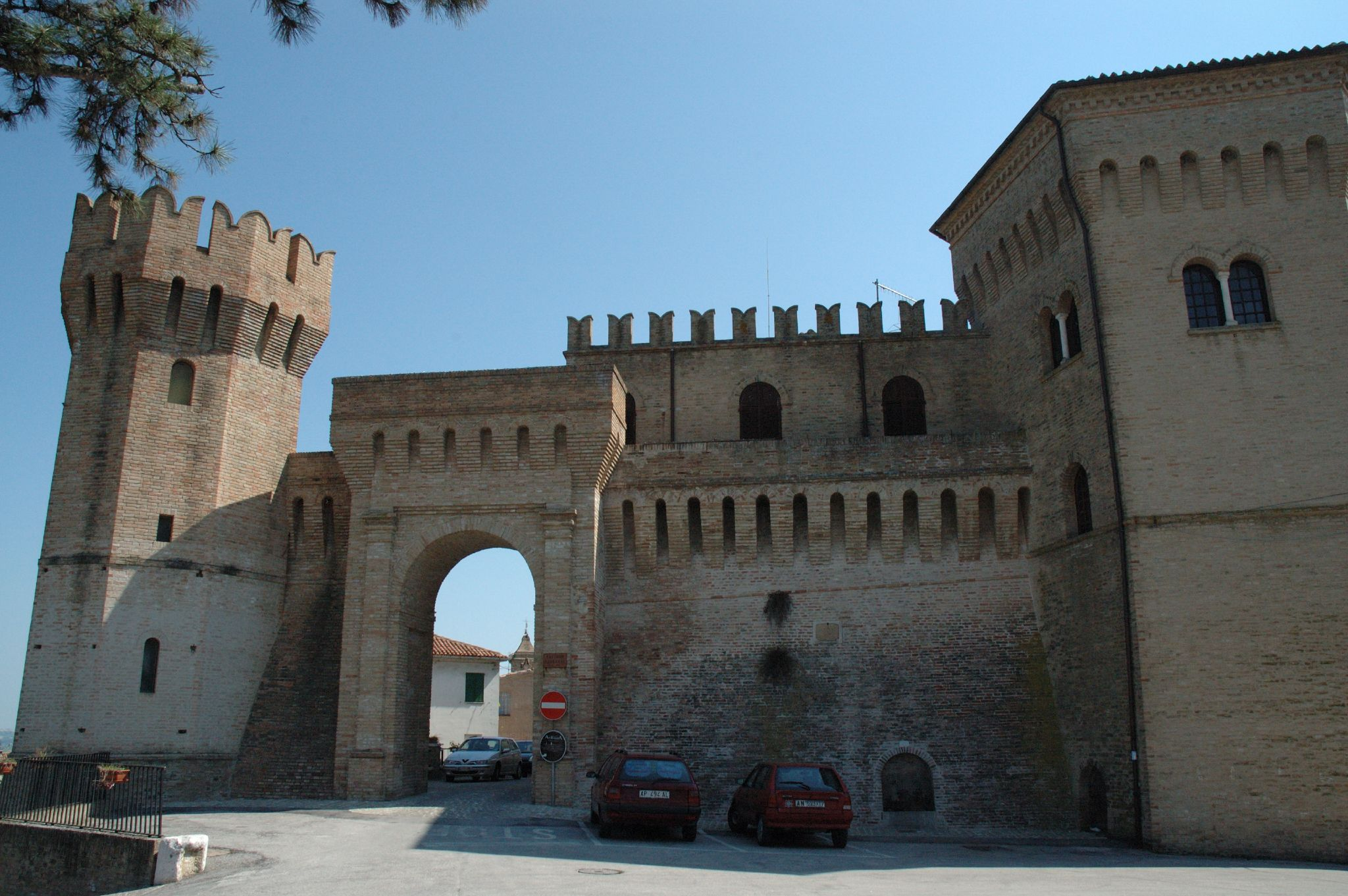 Barbara, Ancona, Marche, Italia